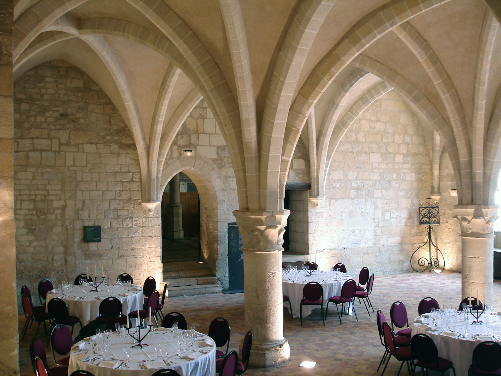 Les cuisines de l'abbaye de Royaumont, Val-d'Oise, France.